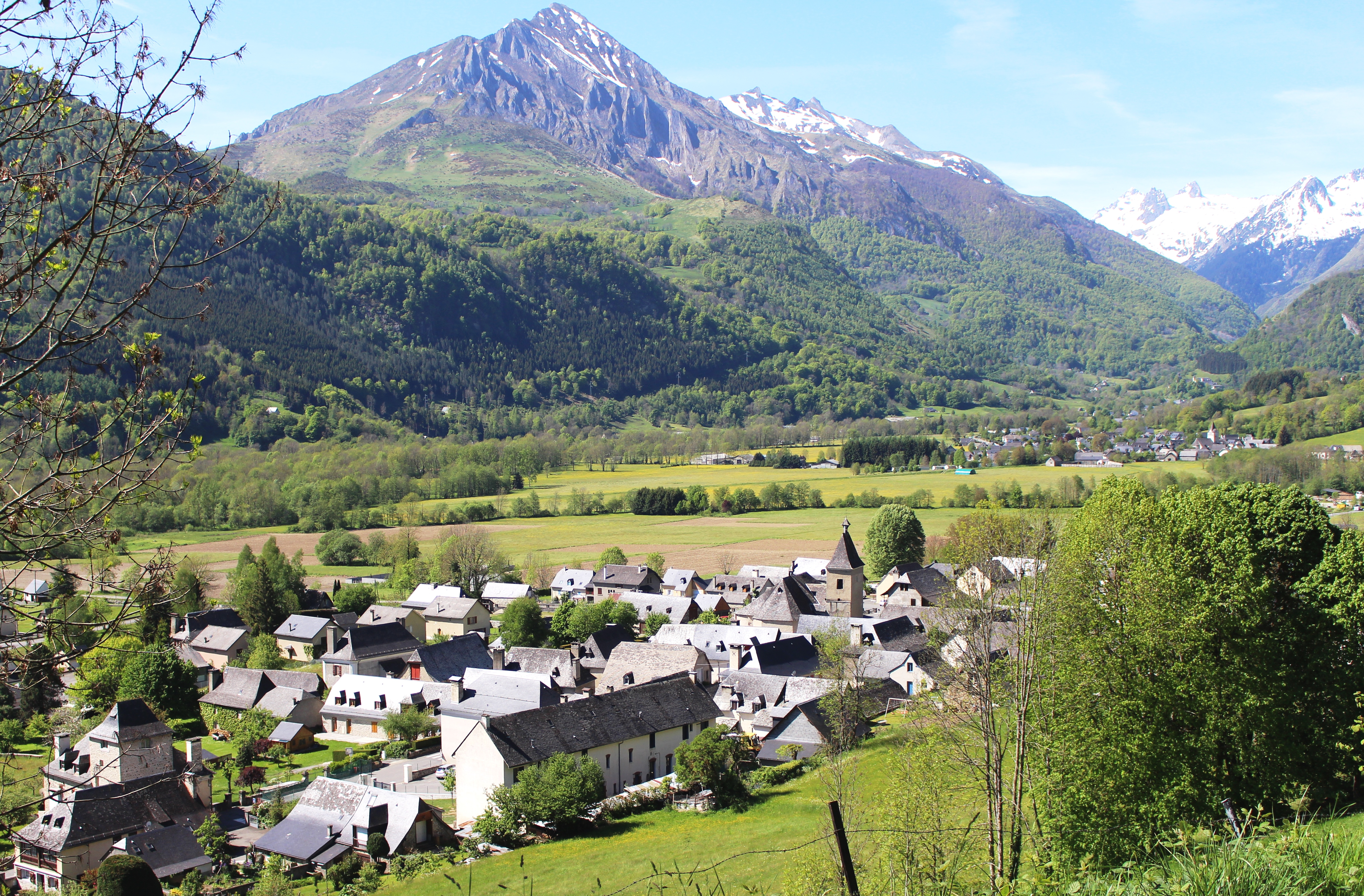 Aucun (Hautes-Pyrénées)